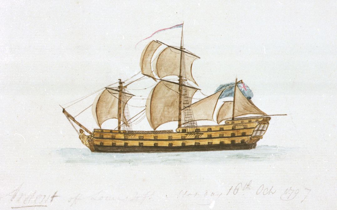 64-пушечный HMS Ardent, сильно поврежденный в Сражении при Кампердауне в гавани Лоустофта 16 октября 1797 года.